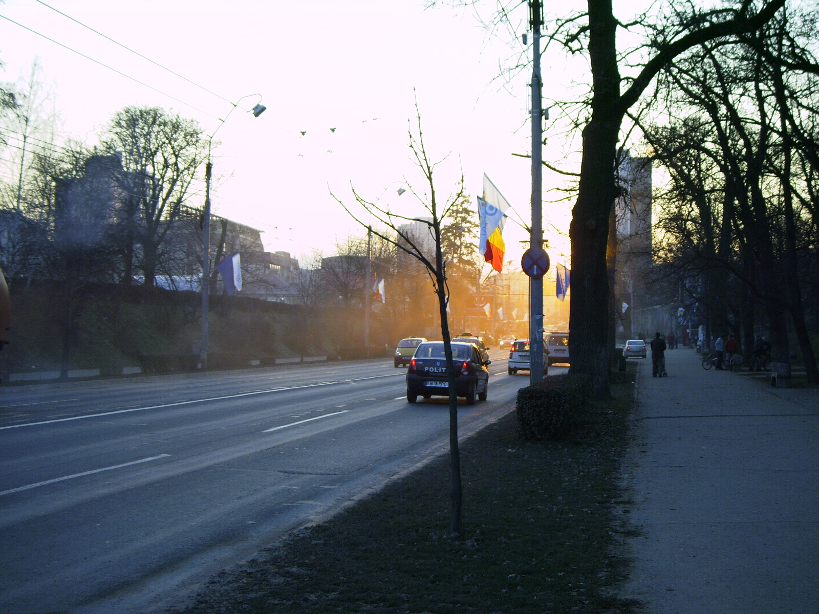 Blick über den Corneliu-Coposu-Boulevard (Bulevardul Corneliu Coposu) in Sibiu (Hermannstadt).